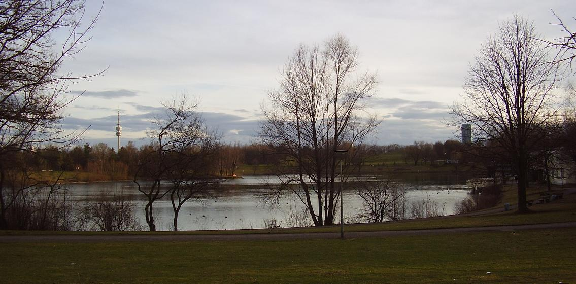 Lerchenauer See in München (Munich / Germany)